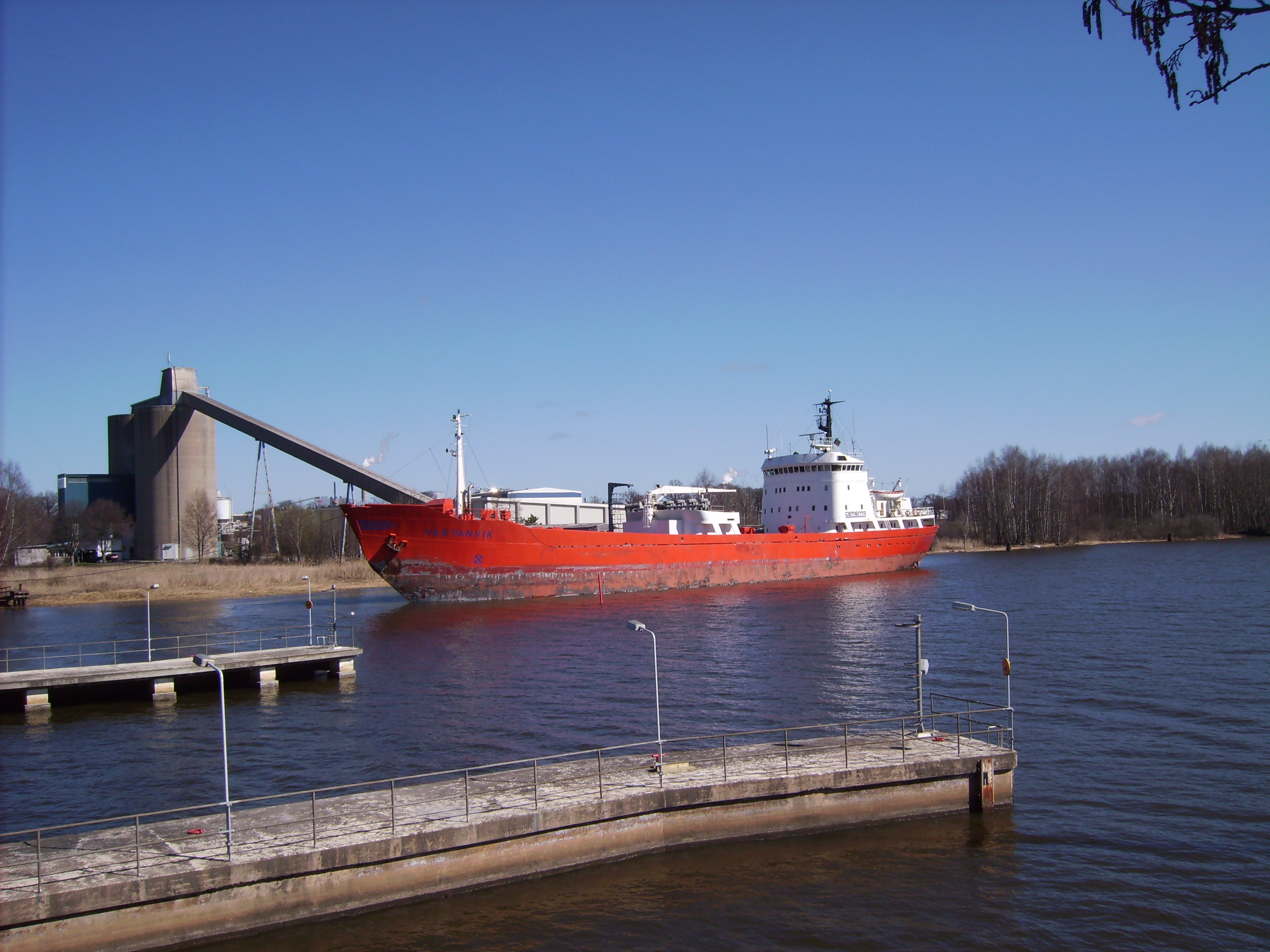 Bilden är fotograferad av Harri Blomberg. Photo by Harri Blomberg.